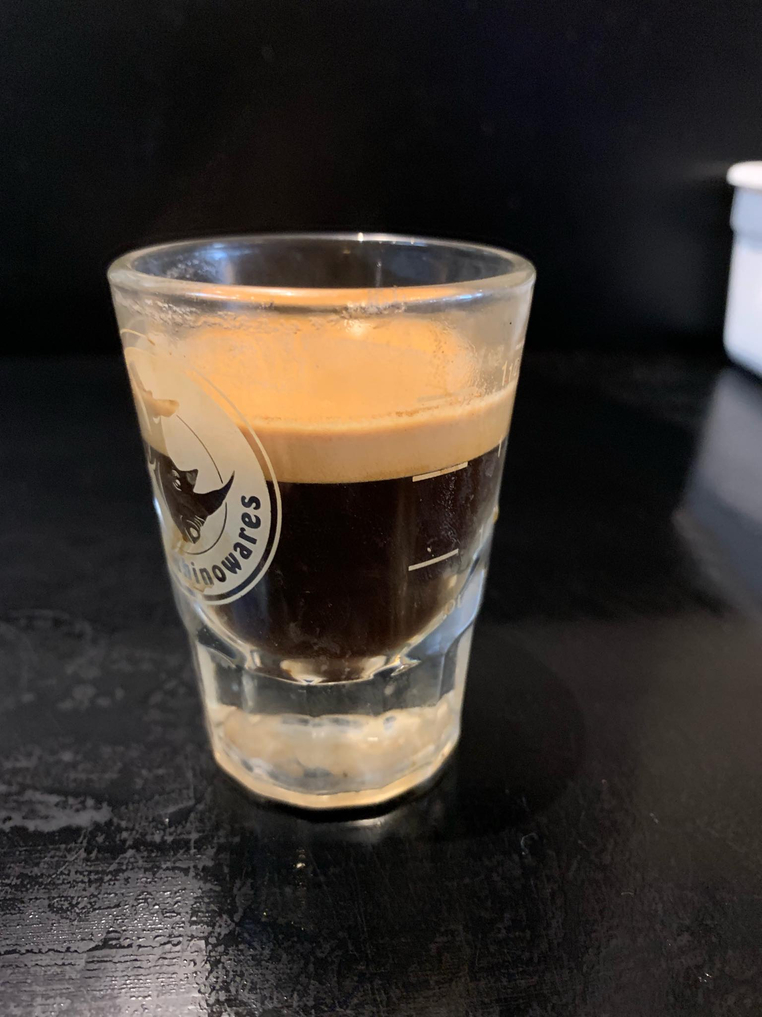 shot